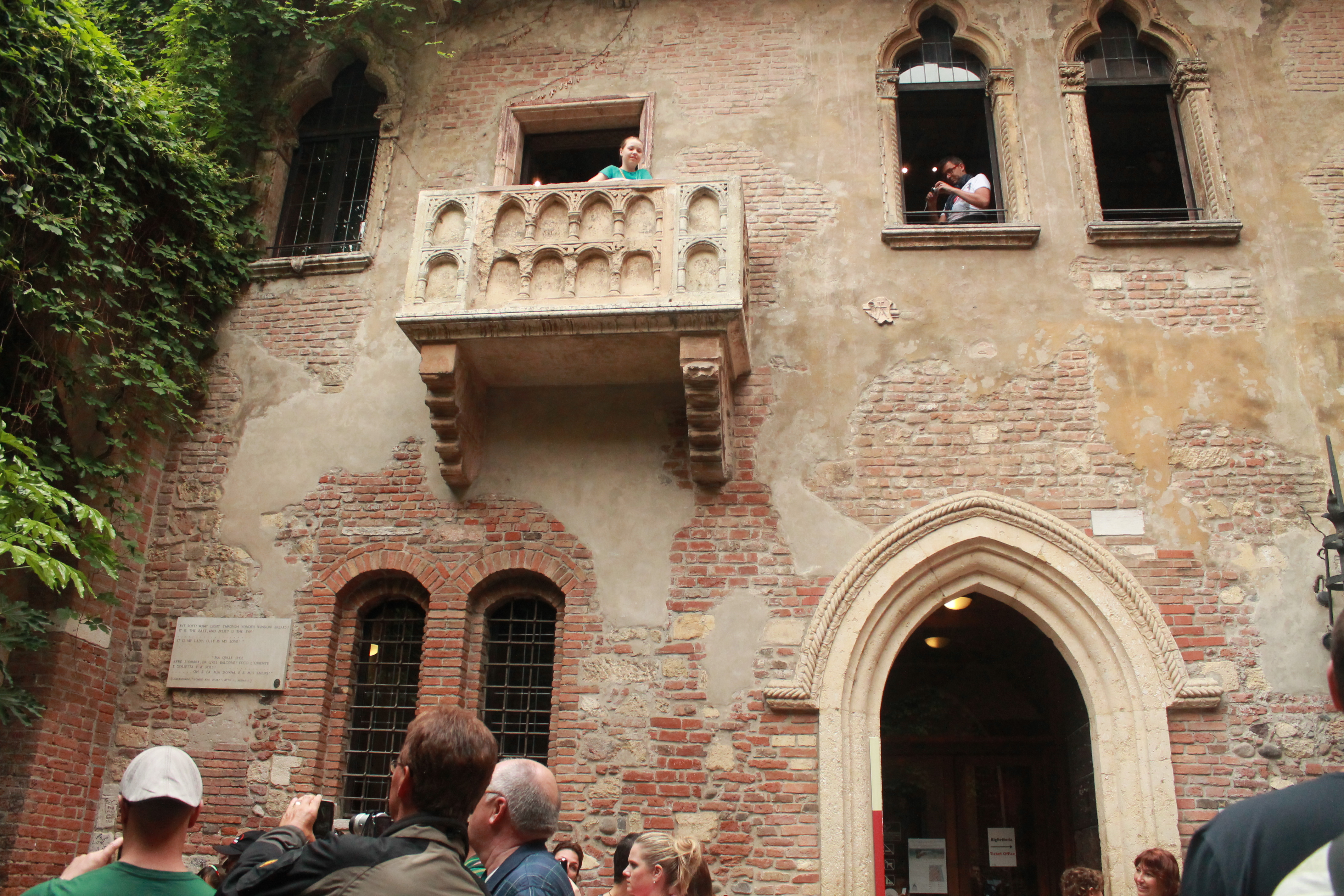 The Romeo And Juliet Balcony in Verona